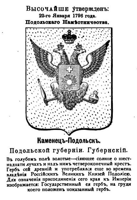 Герб Каменца-Подольска Подольской губернии 1796 года с описанием из гербовника Винклера